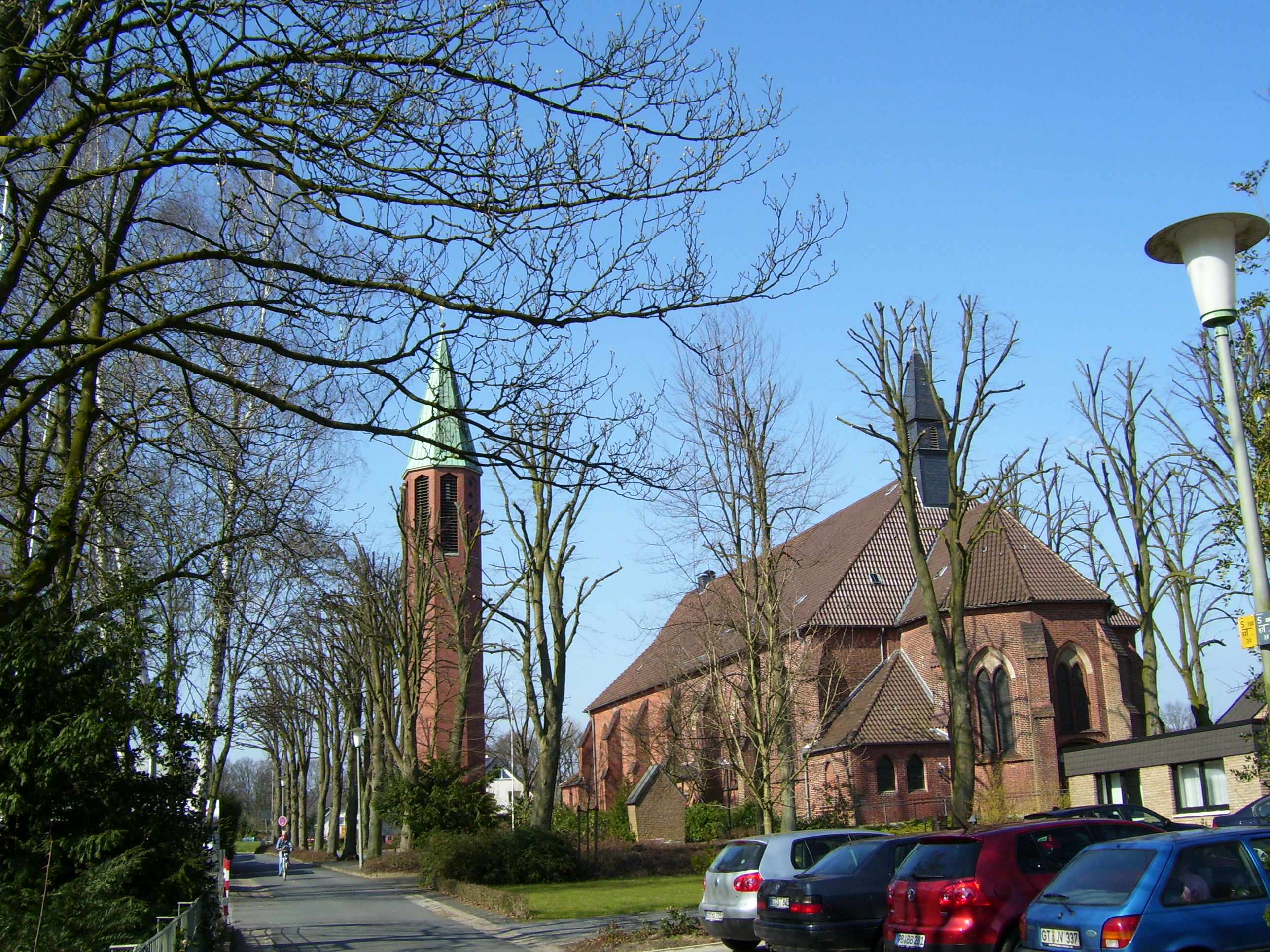 Herz-Jesu-Kirche (Avenwedde) in Gütersloh, Germany